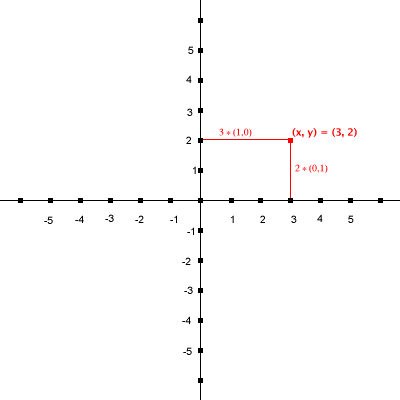 Cqartesische coördinaten Illustratie bij het artikel Poolcoördinaten